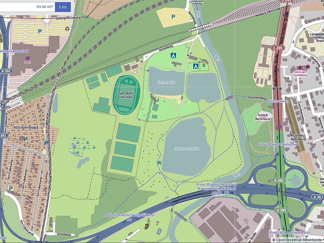 Kartenausschnitt Kennelgebiet, enthält links unten den Schrotweg mit Resten des ehemaligen Wasserwerks Rüningen.